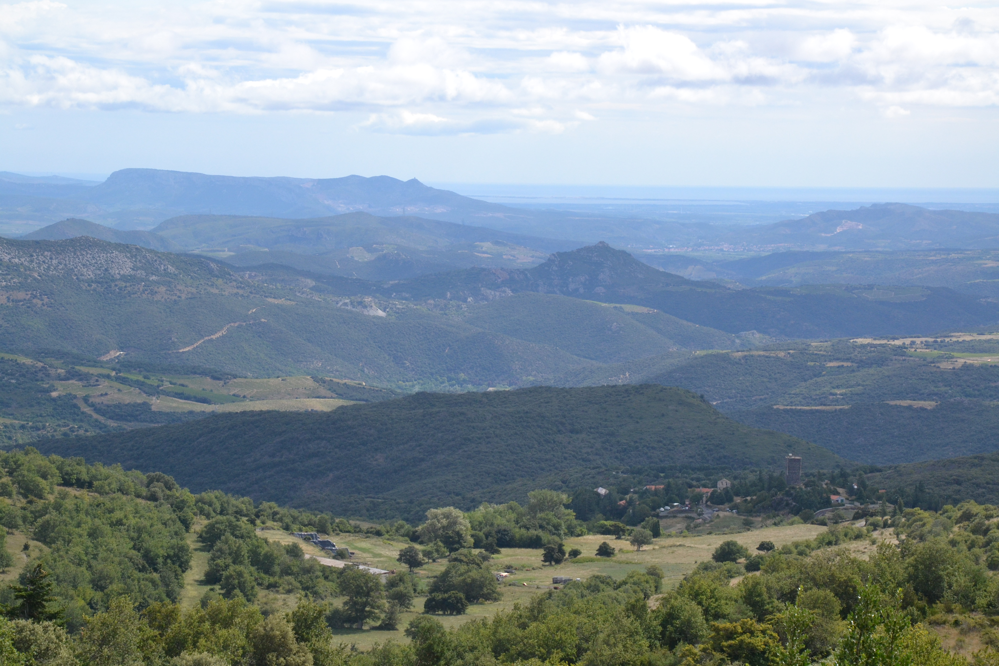 Paysage du Fenouillèdes depuis Prats-de-Sournia (Pyrénées-Orientales, France)